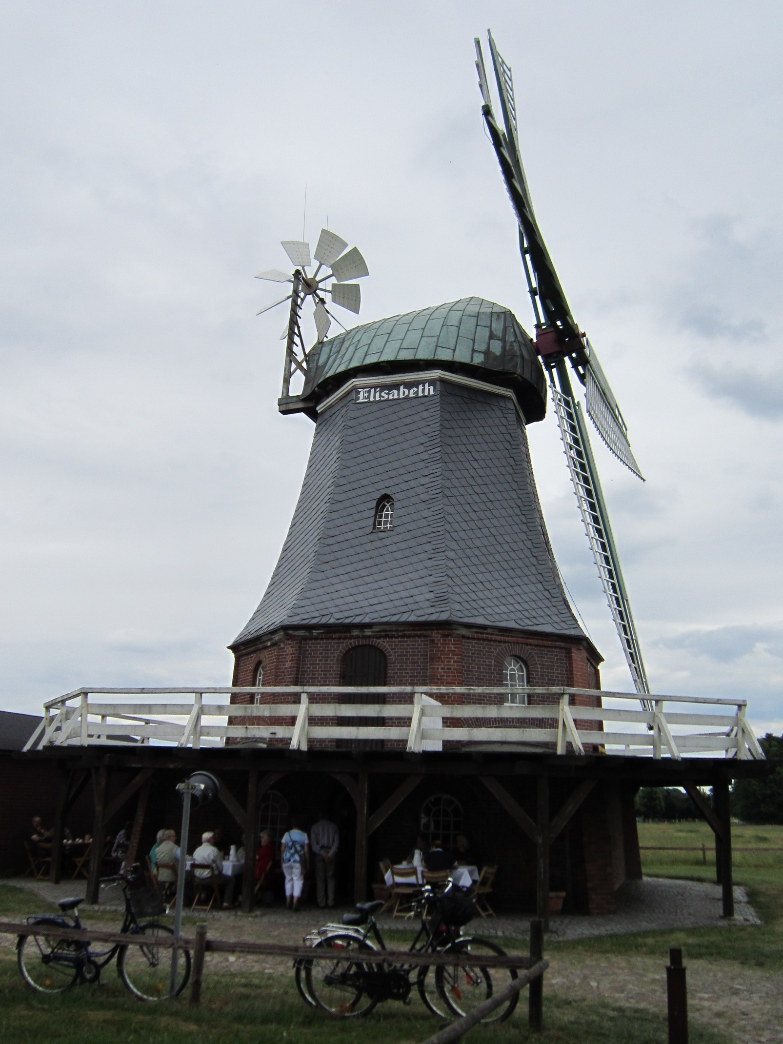 Windmühle Elisabeth (Galerieholländer) in Selsingen (Landkreis Rotenburg/Wümme, Niedersachsen)